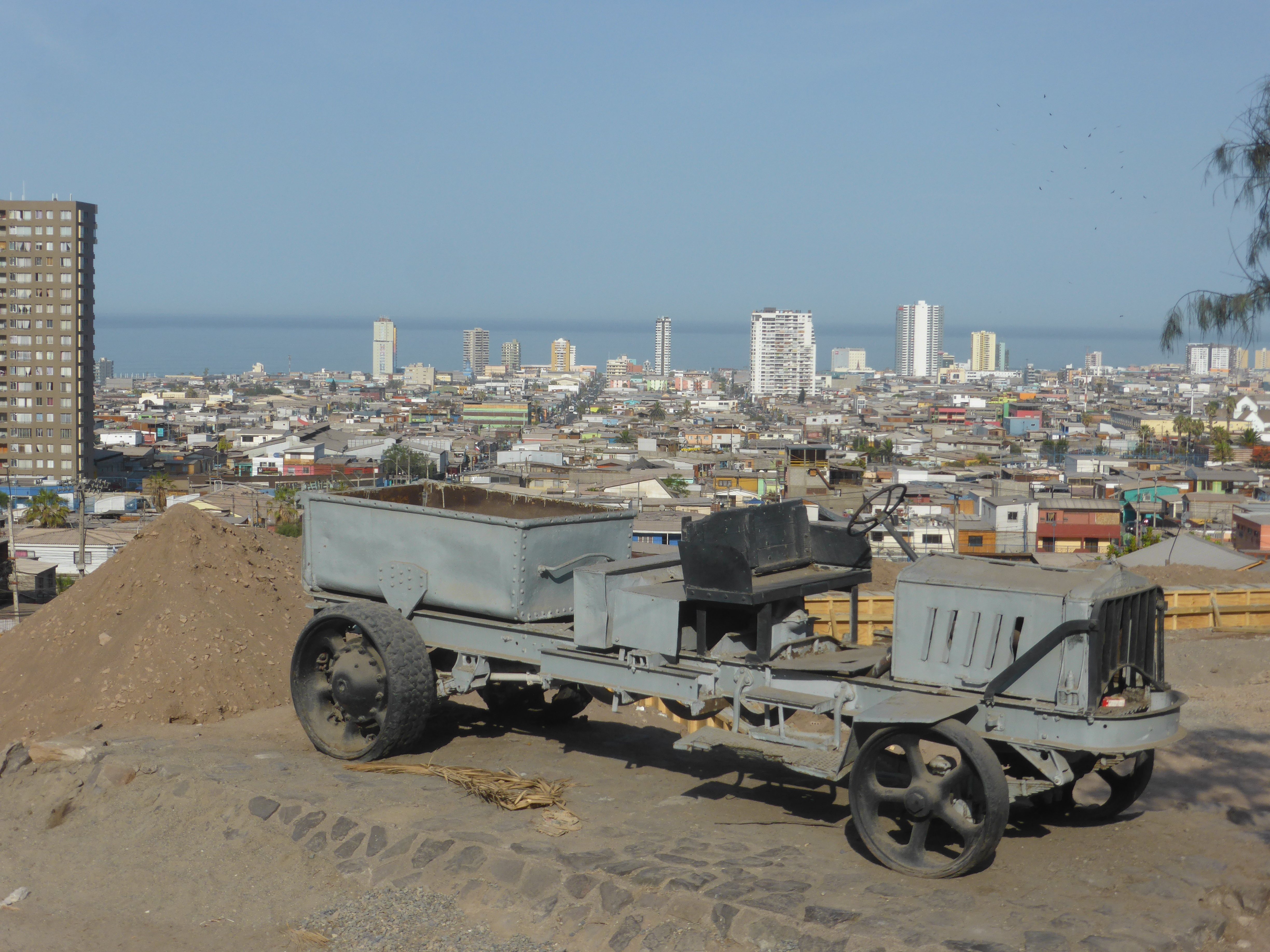 Junto a la autopista que va desde Iquique hacia Alto Hospicio, se encuentra este antiguo camión fabricado por White, en Norteamérica.